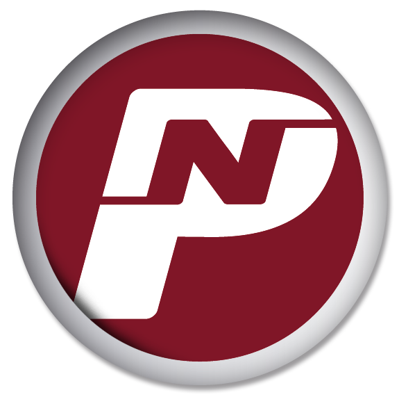 Este es el logotipo original de Nueva Prensa en su versión digital y bajo el nombre comercial